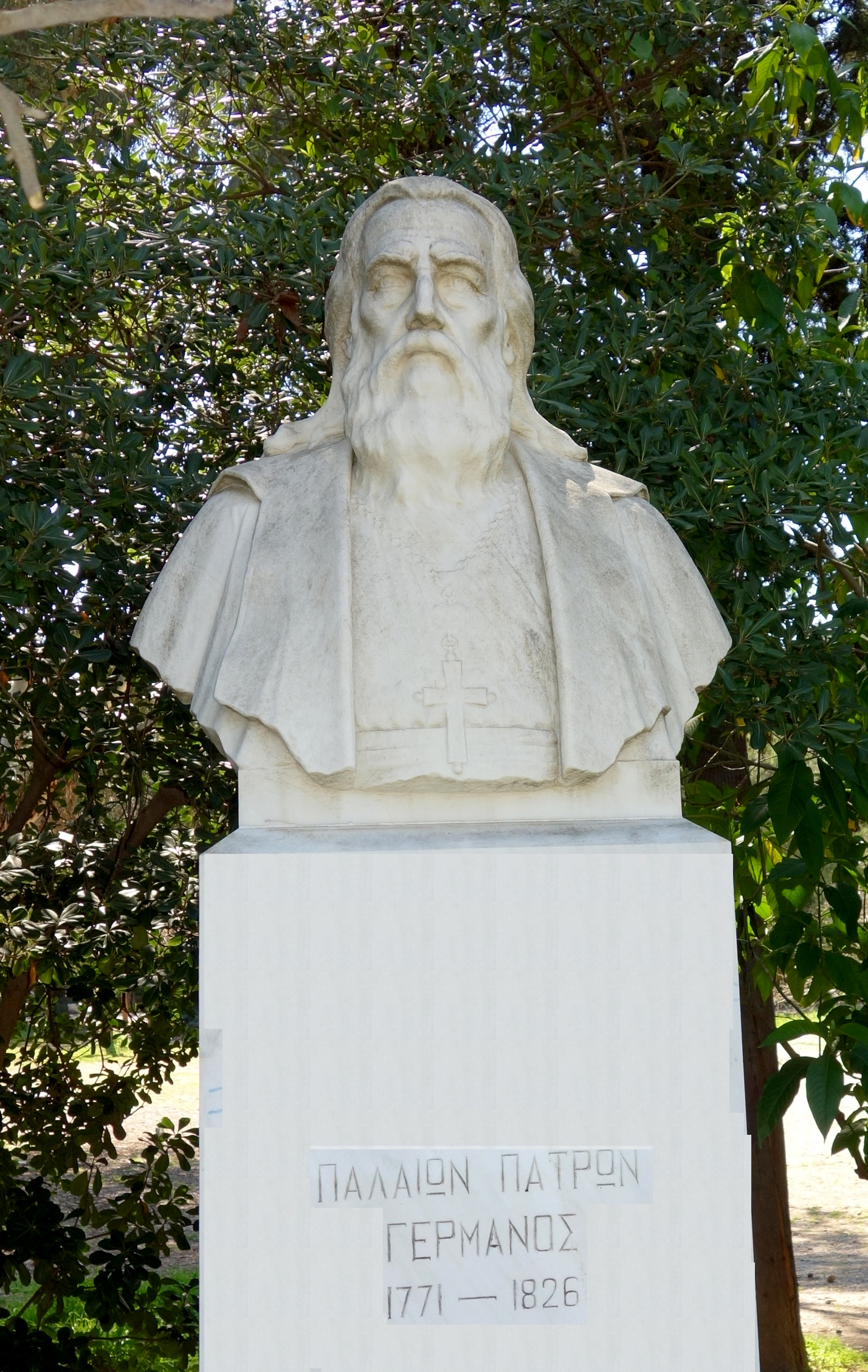 Άγαλμα του Παλαιού Πατρών Γερμανού (έργο του Γεώργιου Συννέφα - 1937 ) στο Πεδίον το Άρεως